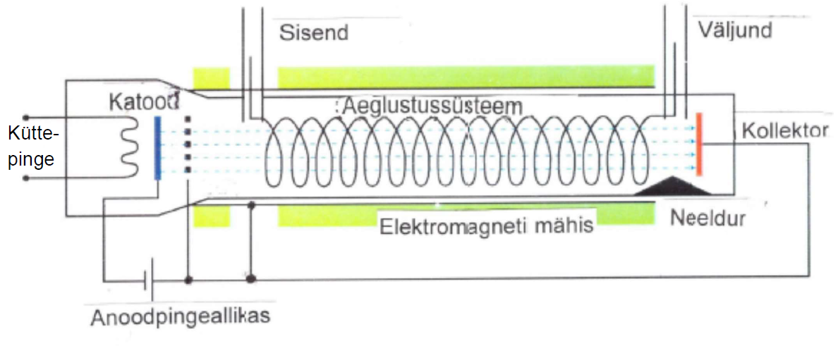 Kulglainelambi ehituse pilt